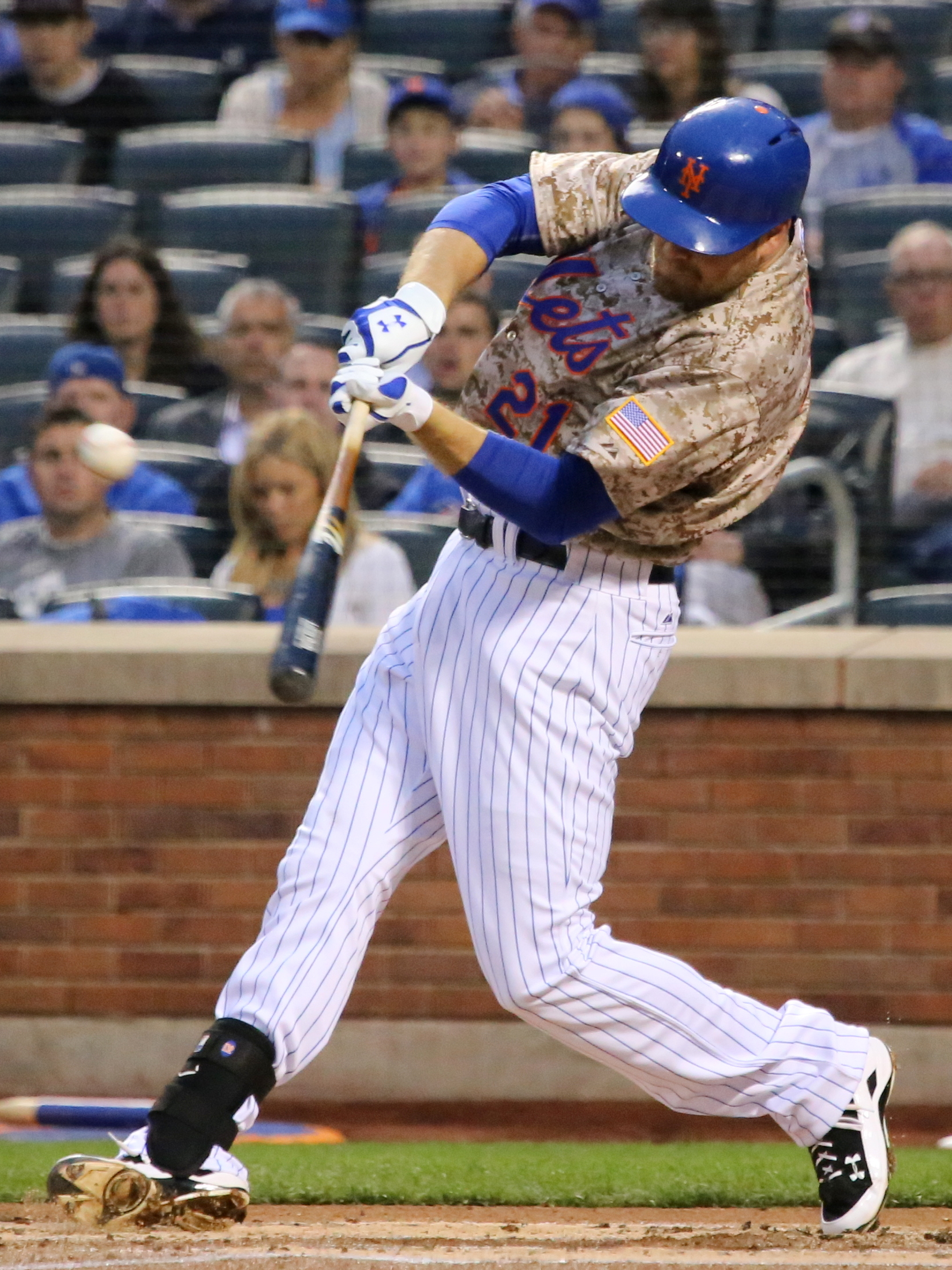 Lucas Duda